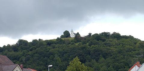 Michaelsberg heute, eigene Aufnahme vom 12.06.2004.